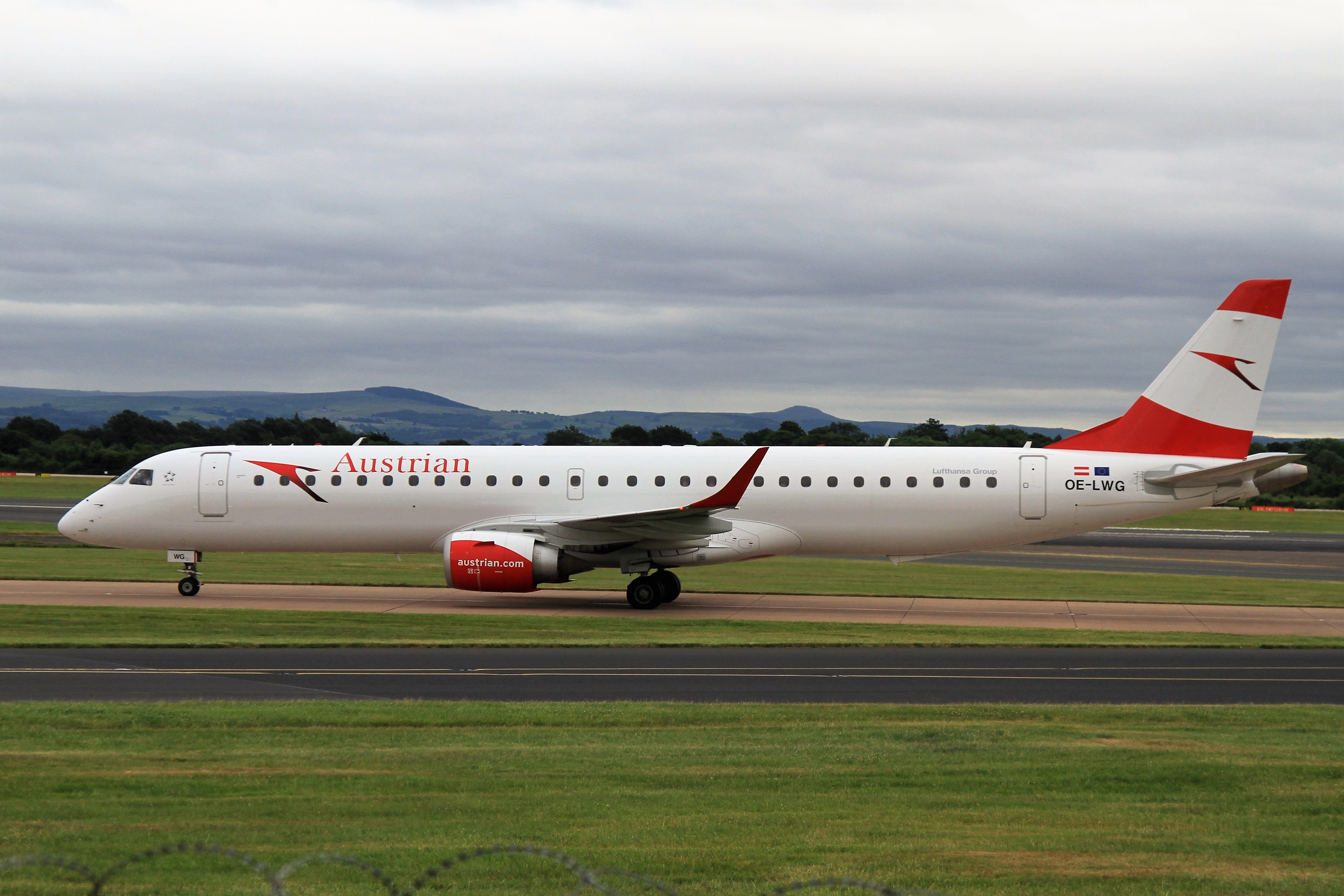 OE-LWG Embraer ERJ195LR Austrian Manchester 23-06-2017